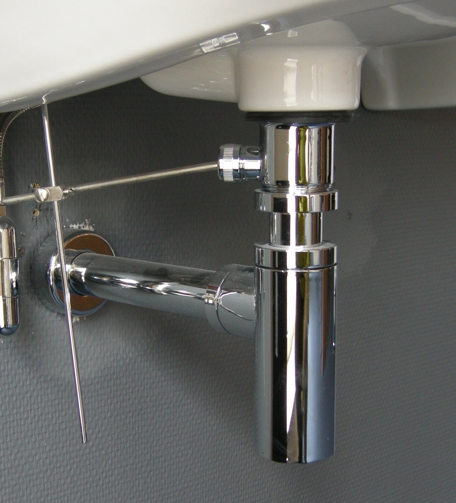 Een moderne designsifon onder de wastafel.